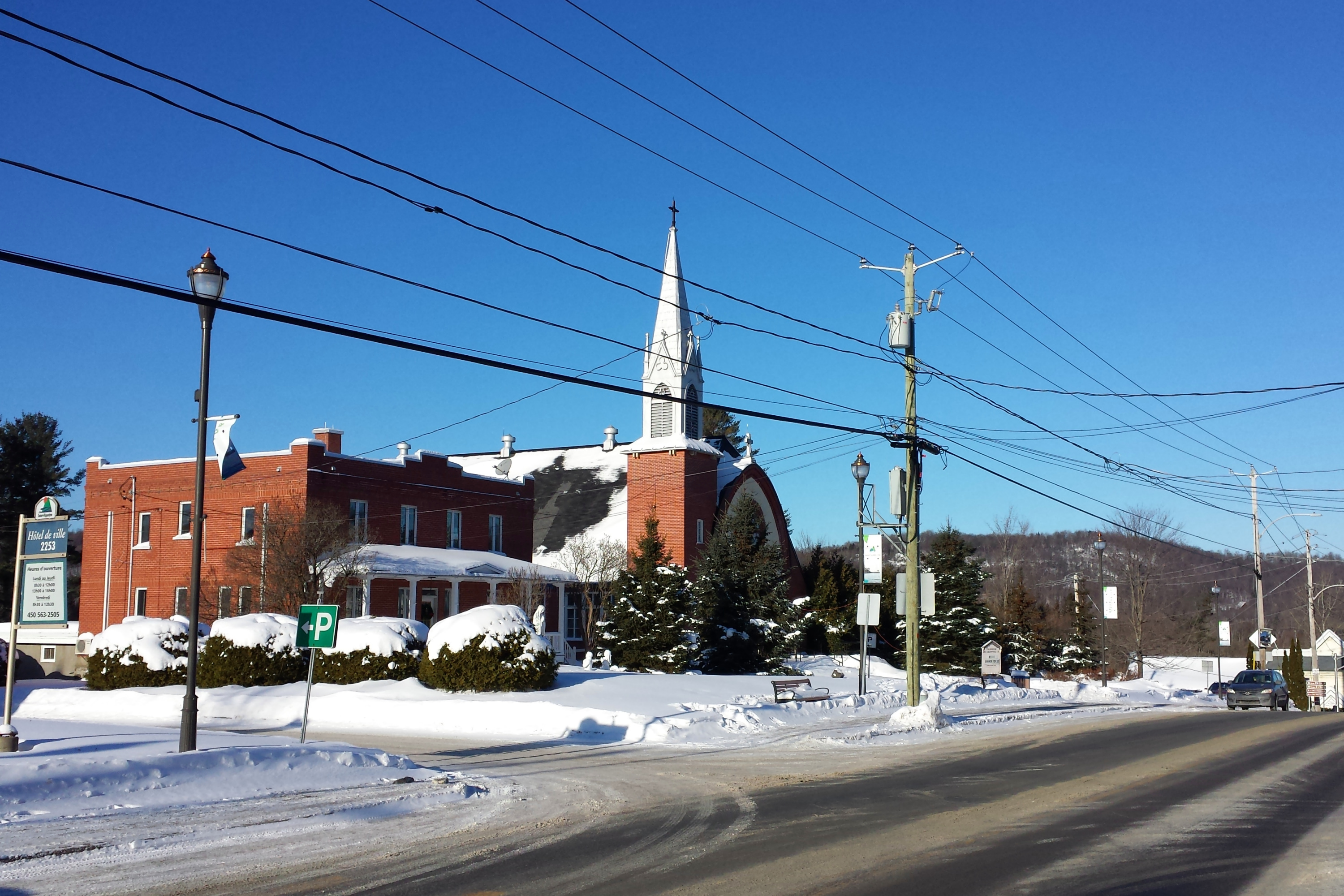 Saint-Hippolyte, Quebec, Canada